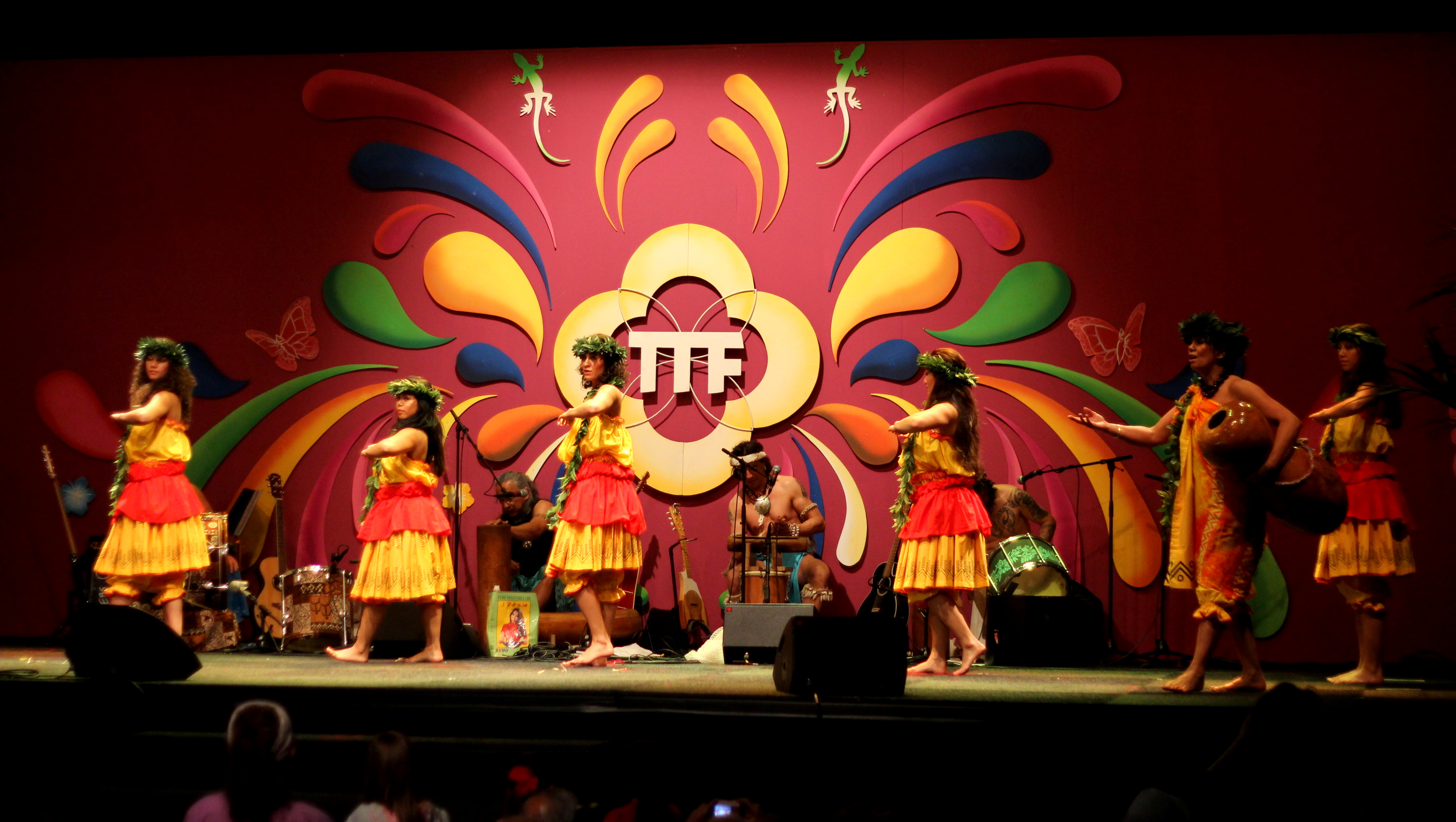 Tong Tong Fair, Den Haag. Mai 2014.